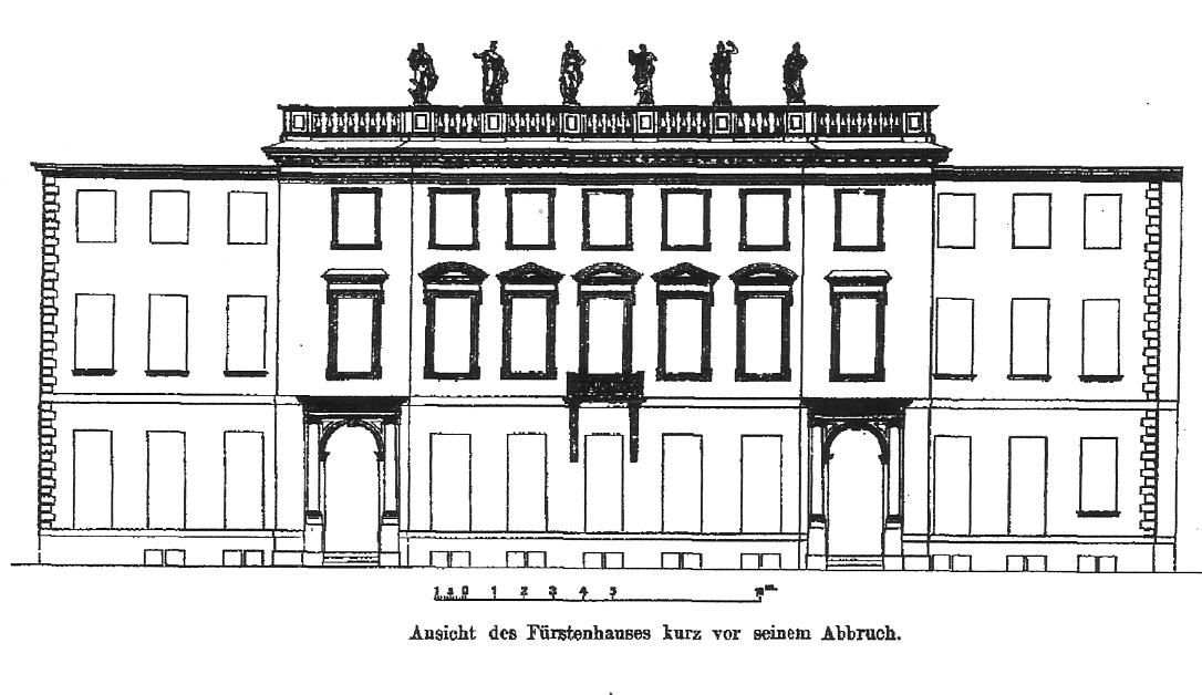 Fassade des Fürstenhauses am Werderschen Markt in Berlin, 1886